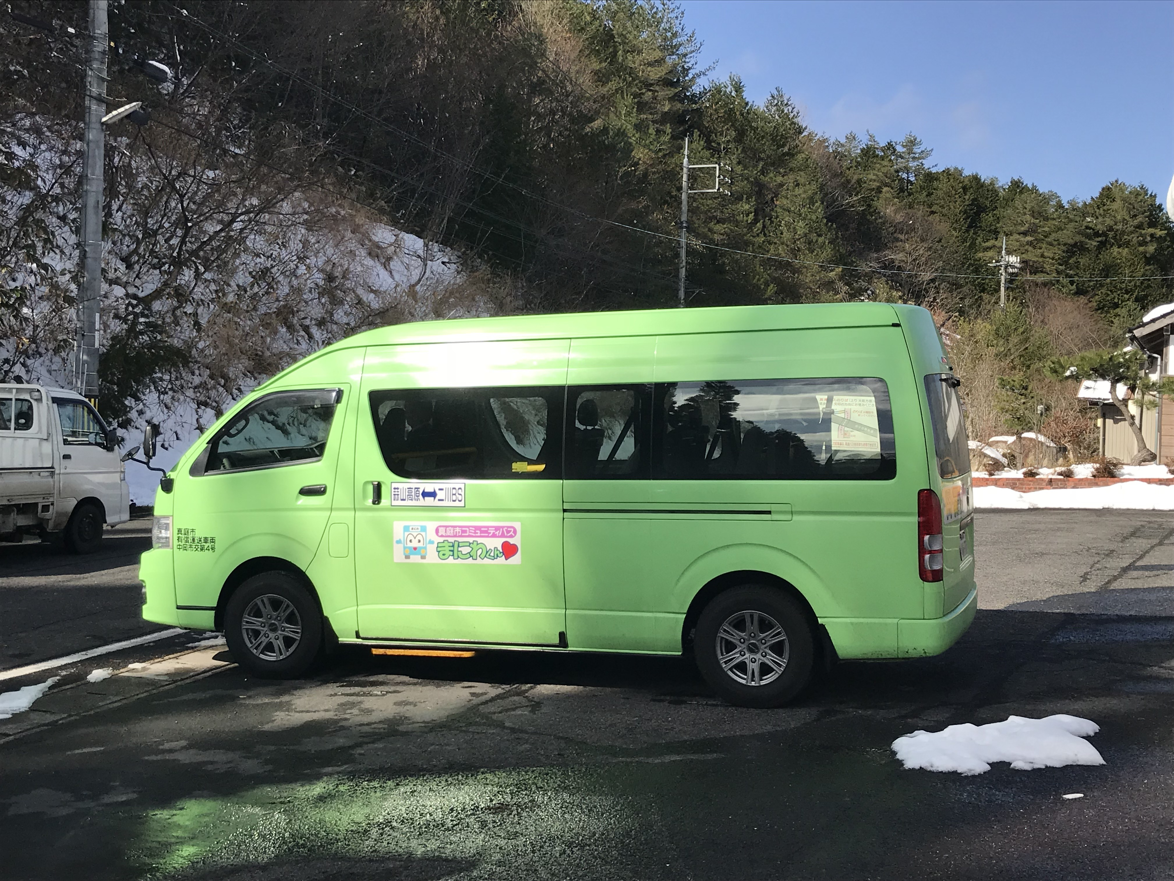 まにわくん❤️ 蒜山（二川BS）ルートの車両